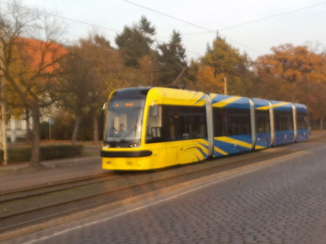 Toruński tramwaj -Swing